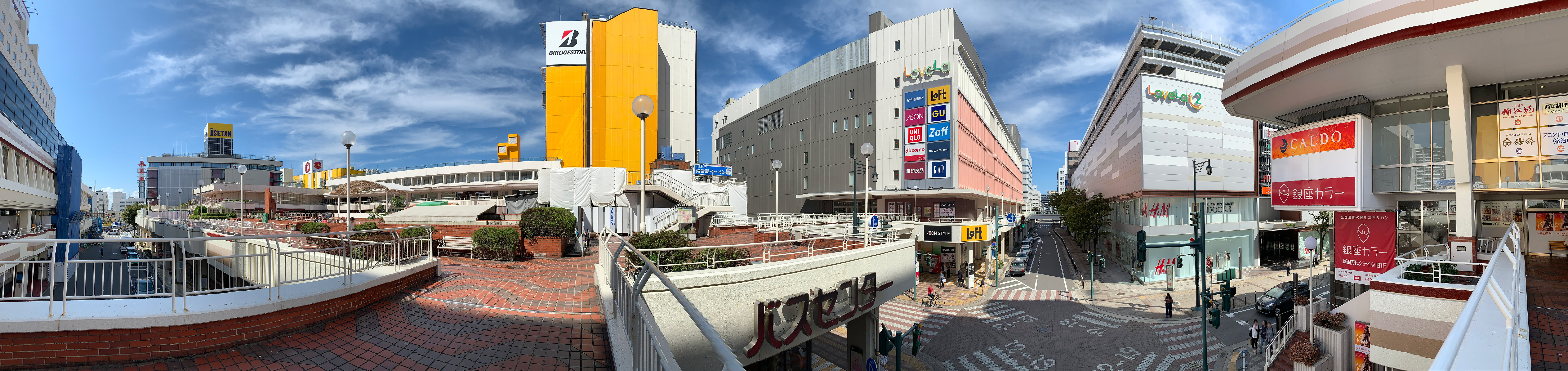 万代シテイの商業施設群（2019年9月撮影）。左から順にシルバーホテルビル、新潟伊勢丹、バスセンタービル、ラブラ万代、ラブラ2、シルバーホテルビル。開店前の店が多い朝時間帯に撮影。